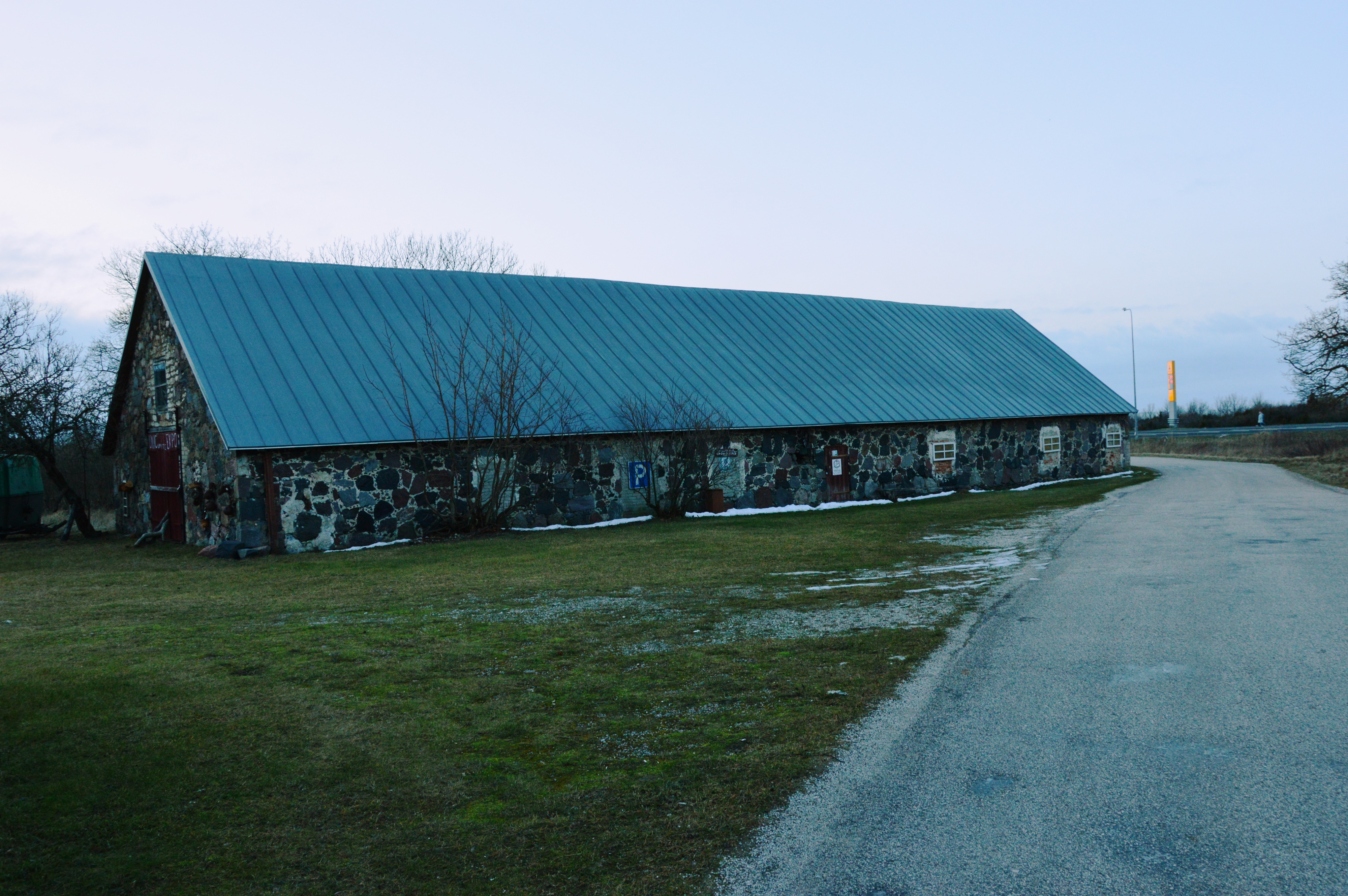 Kirsi vanasõidukite muuseum Virtsus